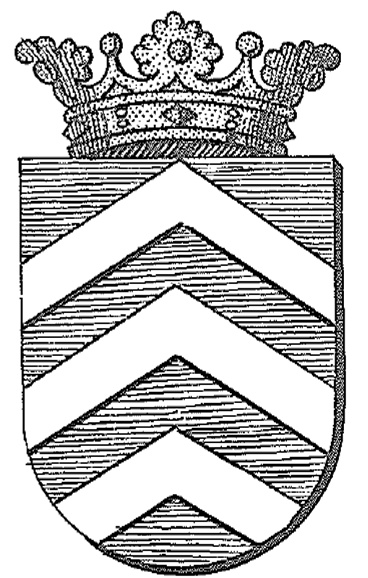 Znak rodiny Braida di Ronsecco